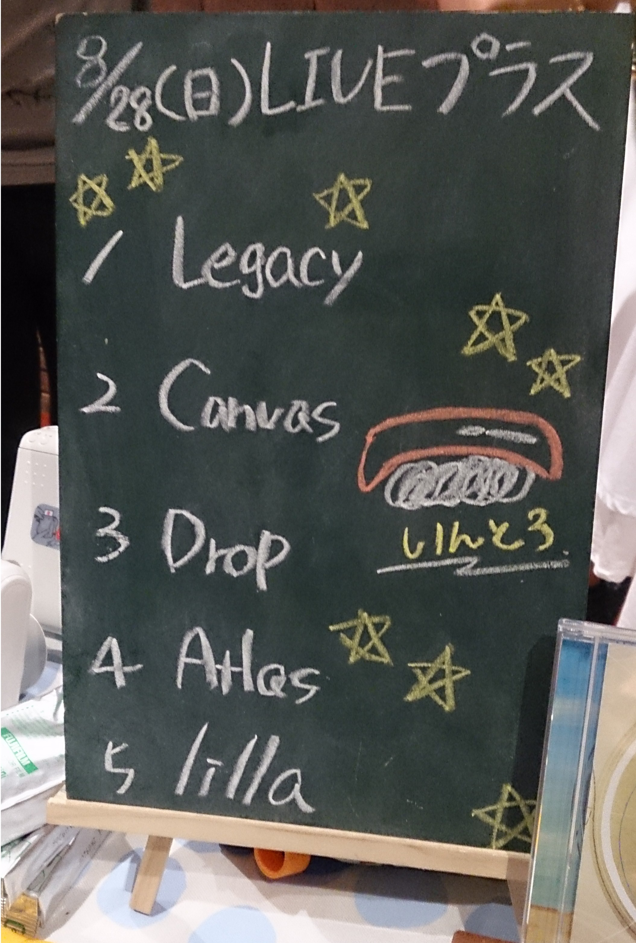 amiinAセトリボード(20160828(1))